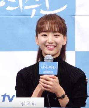 tvN 드라마 ‘날 녹여주오’ 제작발표회가 20일 오후 서울 강남구 논현동 임피리얼 팰리스 호텔에서 열렸다.